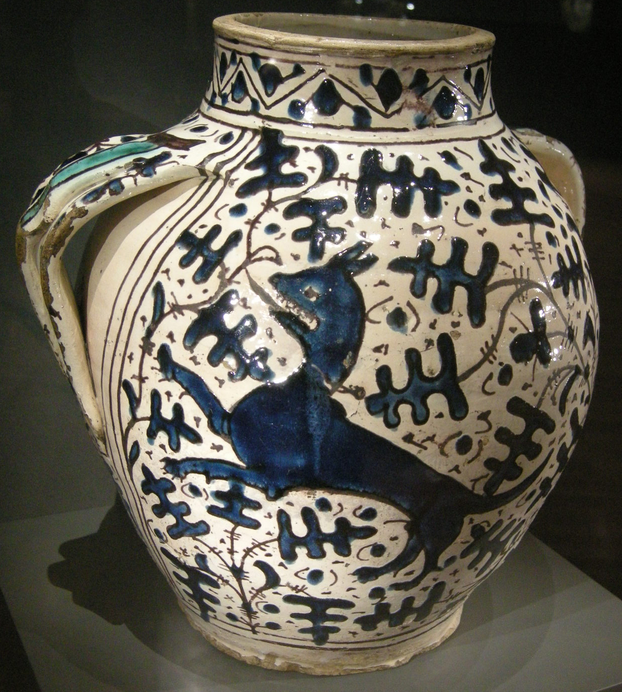 Ngv, maiolica di firenze, contenitore da farmacia da santa maria nuova, 1430-50